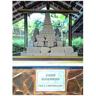 Candi Smansawa